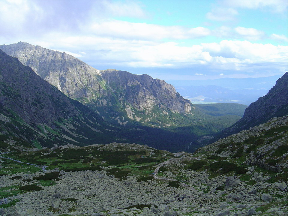 Ostrva and Tupa over Mengusovska dolina